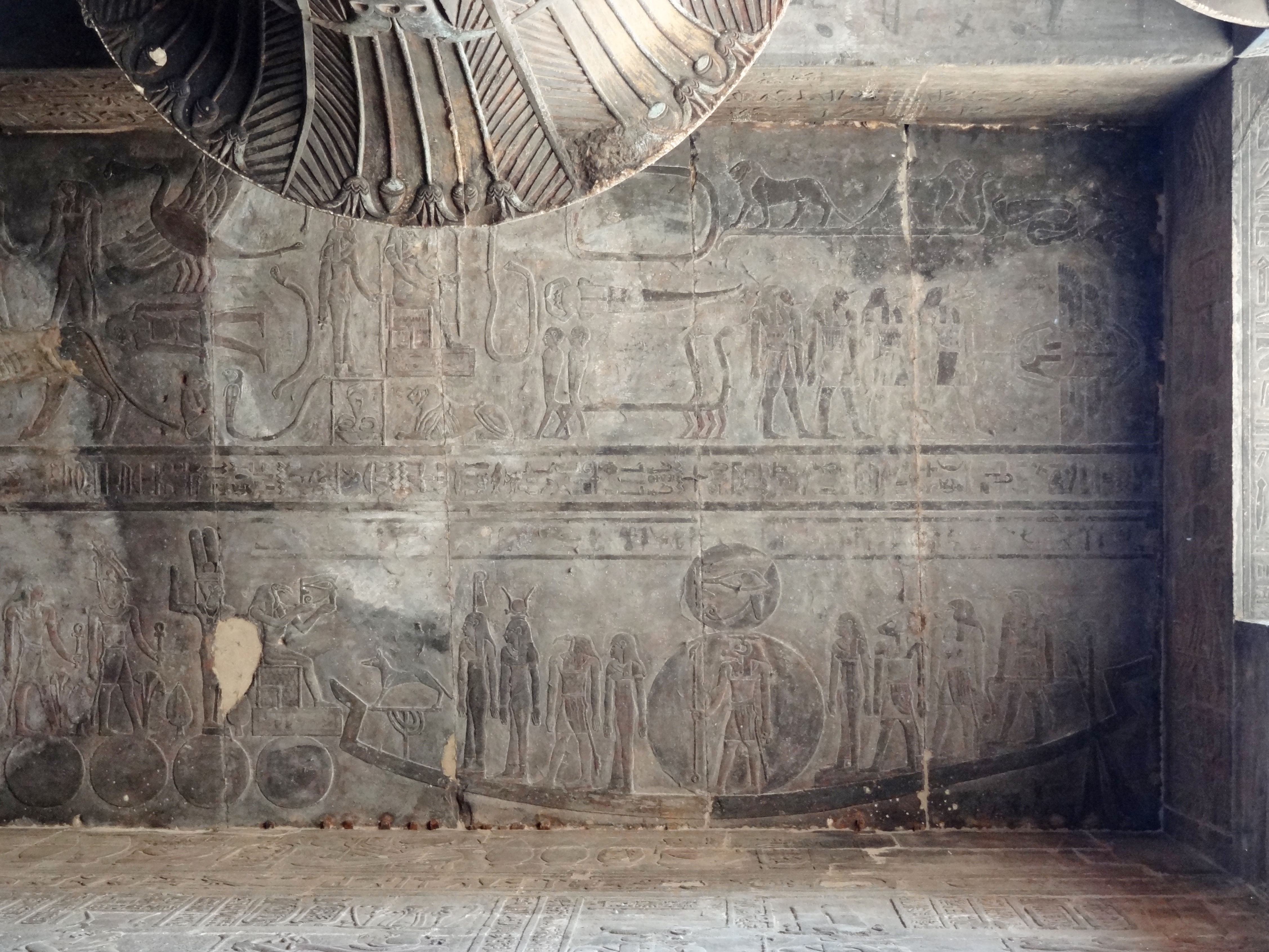 Deckenrelief im Pronaos des Tempels von Esna aus römischer Zeit, Ägypten